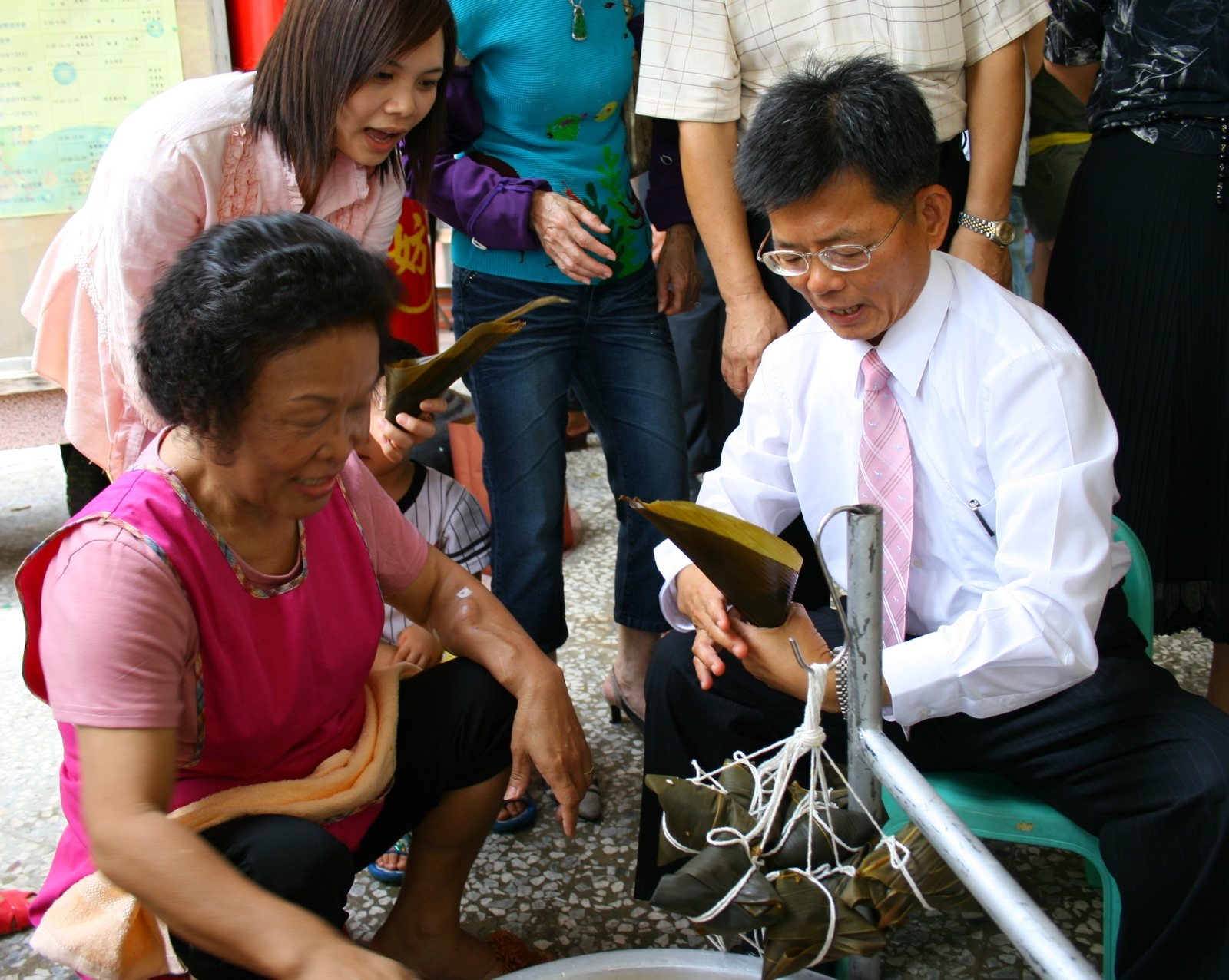 關懷中低收入戶家庭，高雄縣政府特別結合高雄縣慈善團體聯合協會與相關社會福利機構，募集1萬5千顆愛心粽分送三山地區弱勢家戶，尤以去年遭受莫拉克颱風重創的旗山鎮為大宗。